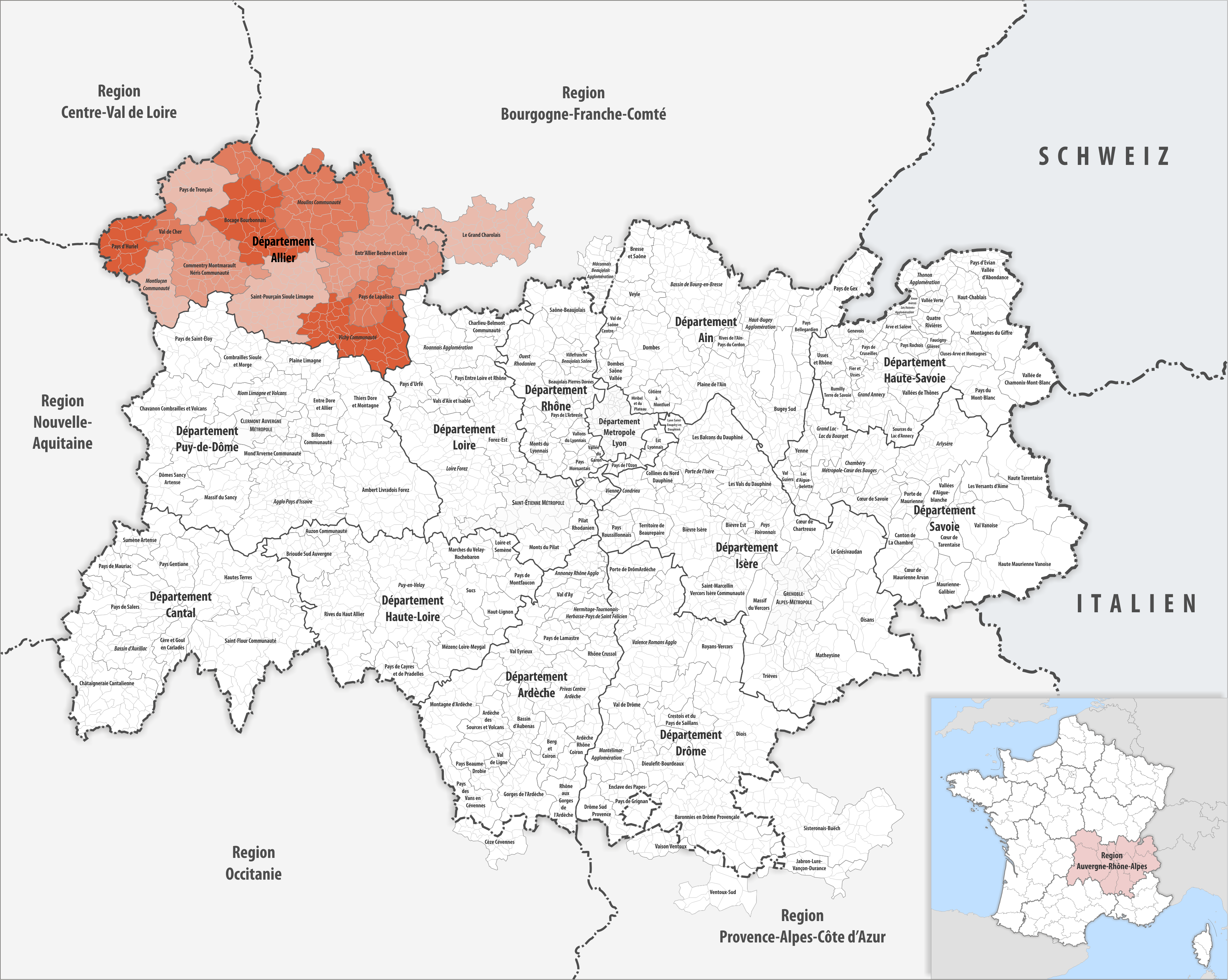 Gemeindeverbände im Département Allier